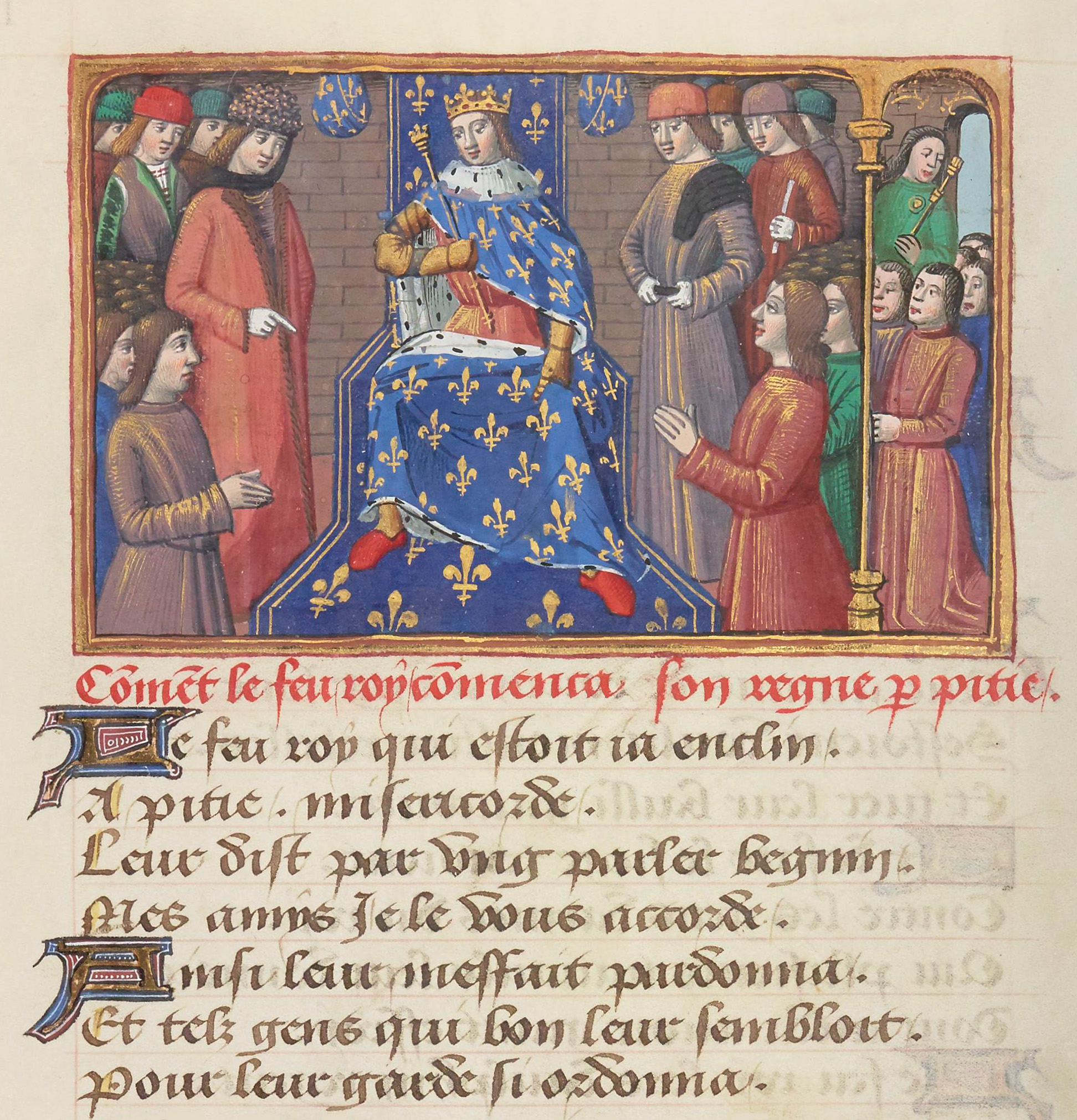 Audience de Charles VII.